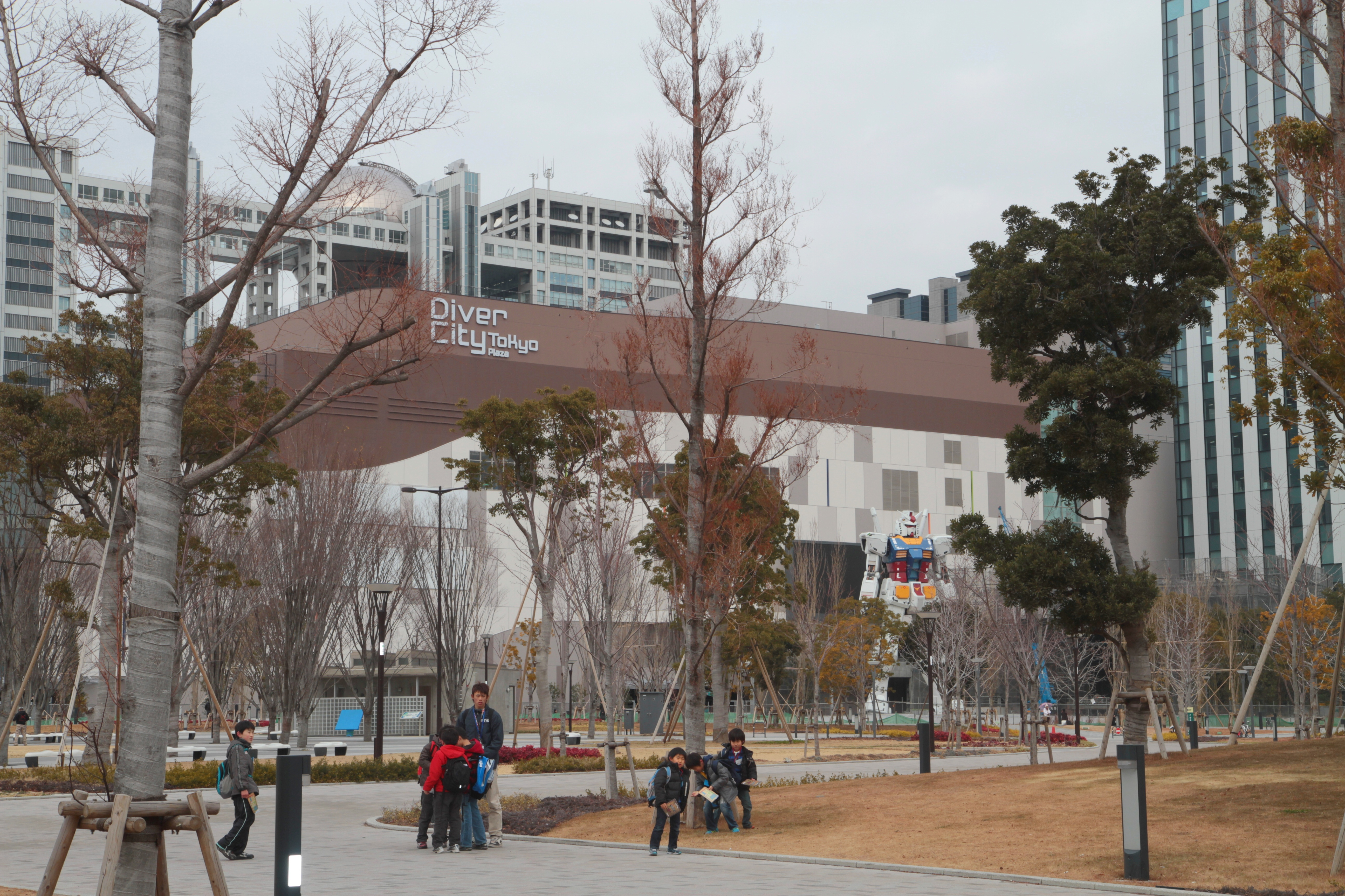 機動戦士ガンダム